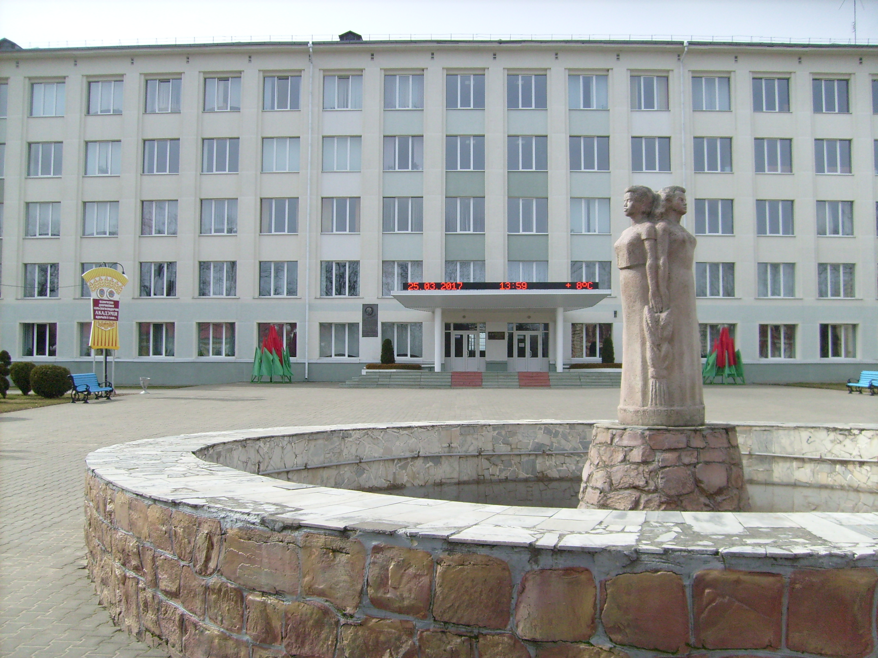 Белорусская сельскохозяйственная академия. Учебный корпус №10